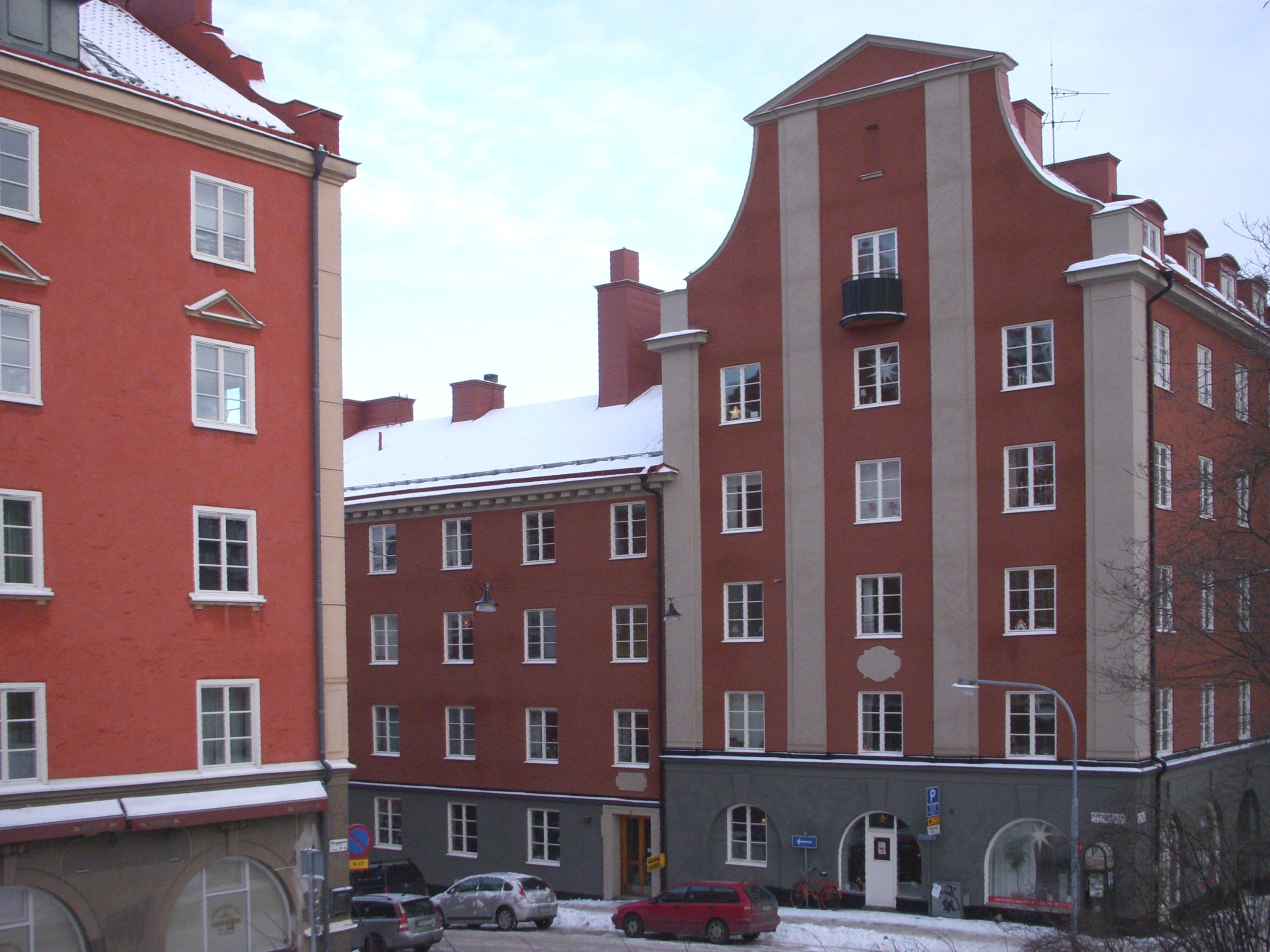 "Röda bergen" i Vasastan i Stockholm